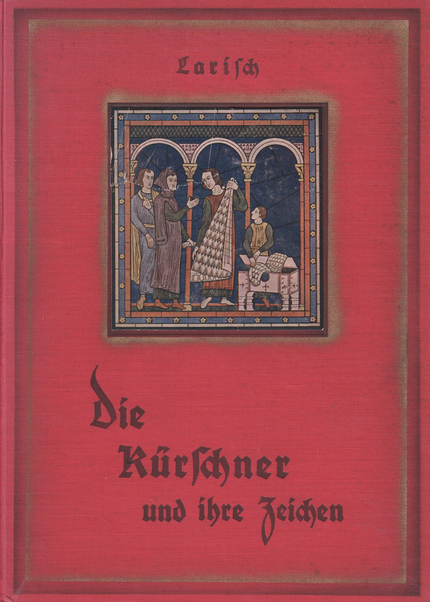 Paul Larisch: Die Kürschner und ihre Zeichen. Beiträge zur Geschichte der Kürschnerei. Buchdeckel. In einem Band mit 300 Abbildungen. Im Selbstverlag, Copyright by Paul Larisch, Berlin SW 48, Friedrichstraße 237, 1928. Paperback, 182 Seiten, 18,5 x 26 cm